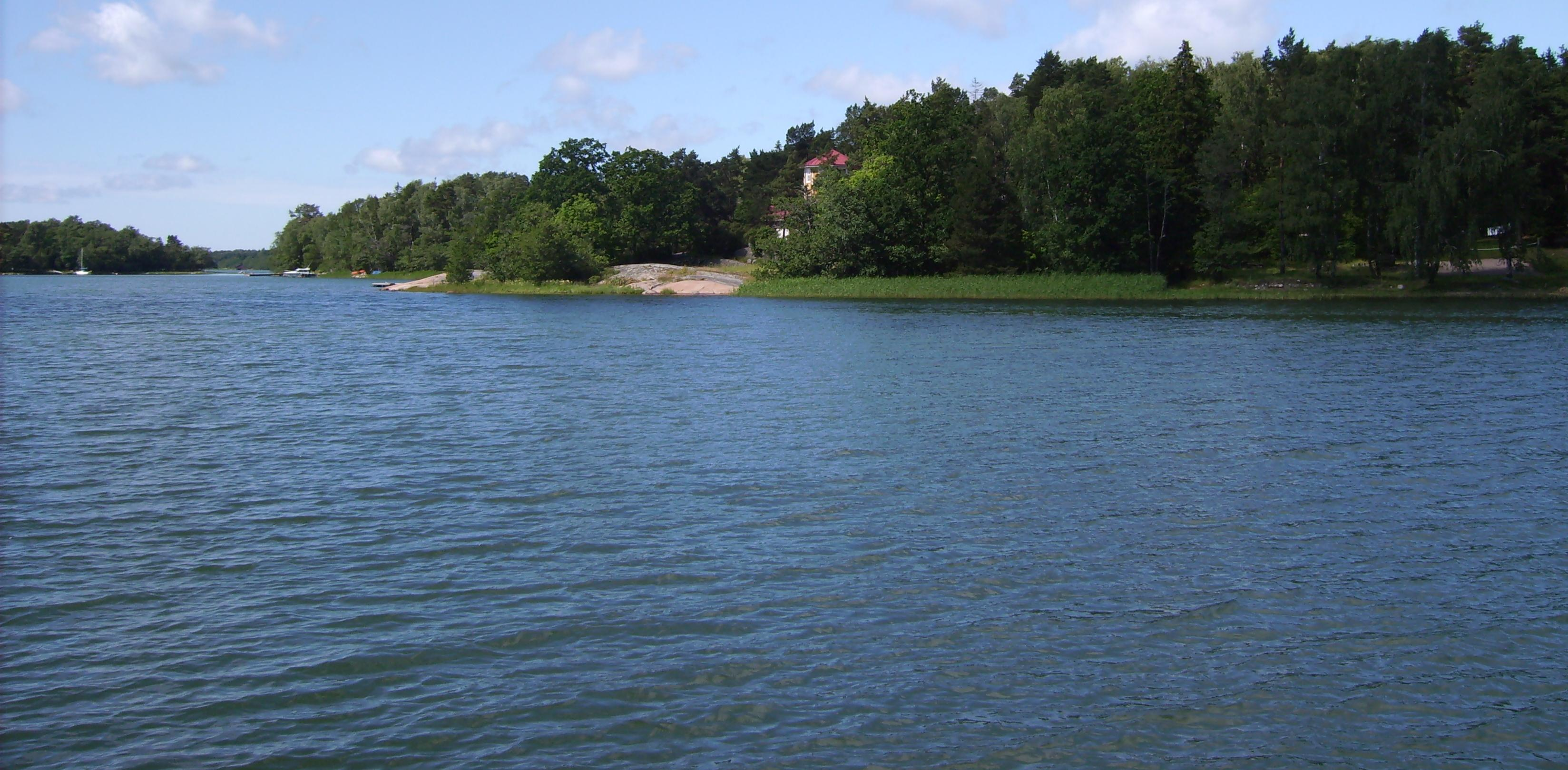 The harbour "Prästgårdens småbåtshamn" for small boats alongside the bay "Kuggviken" in Korpo, Finland.